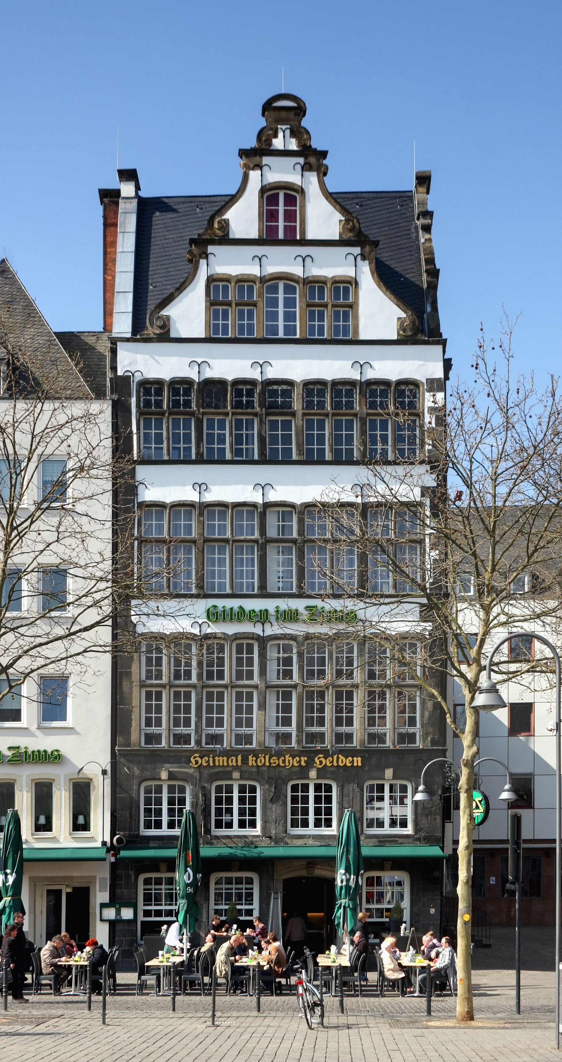 Denkmalgeschütztes Wohn- und Geschäftshaus „Gilden im Zims“ - „Heimat kölscher Helden“, ehemals Gasthaus zum St. Peter, Heumarkt 77, Köln. Baujahr: nach 1568, 1898 und nach 1945 erneuert.